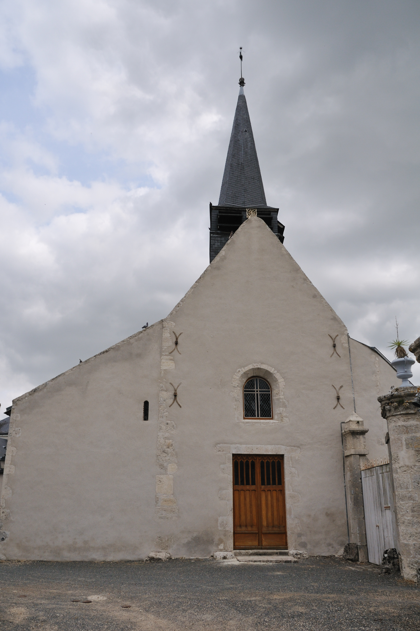 Église Saint-Ay, Saint-Ay, Loiret, France